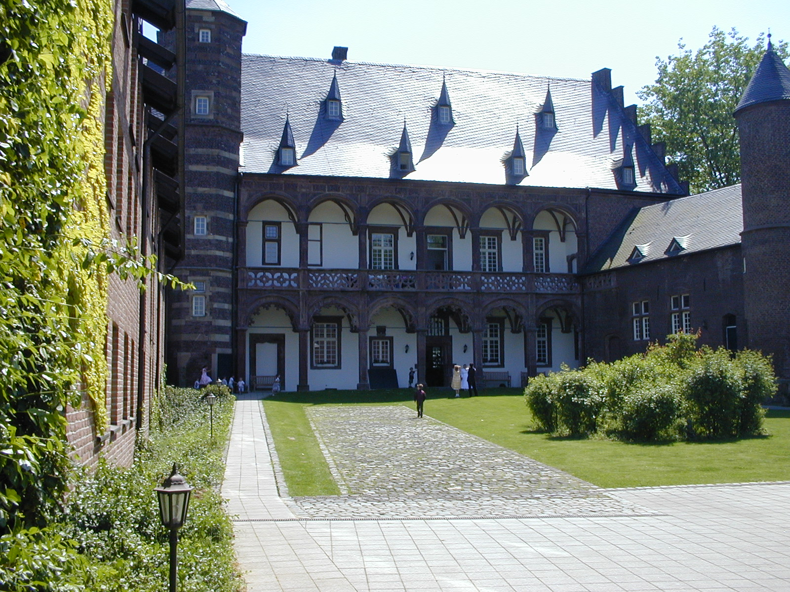 Burg Binsfeld in Burg in Nörvenich-Binsfeld mit dem einzigartigen Arkadengang GNU, eigenes Fotos